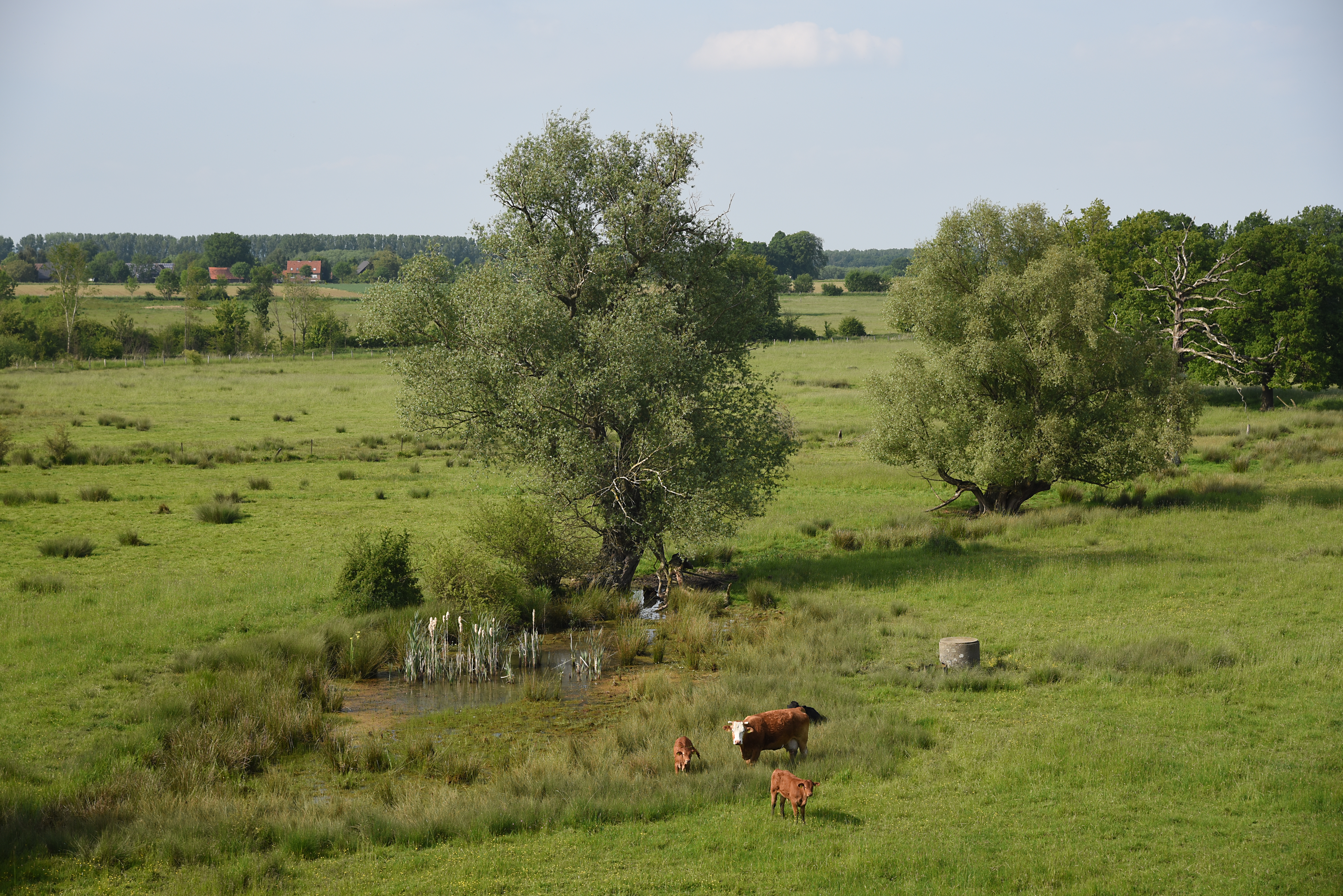 Naturschutzgebiet Ahsewiesen in Nordrhein-Westfalen im Kreis Soest in Lippetal